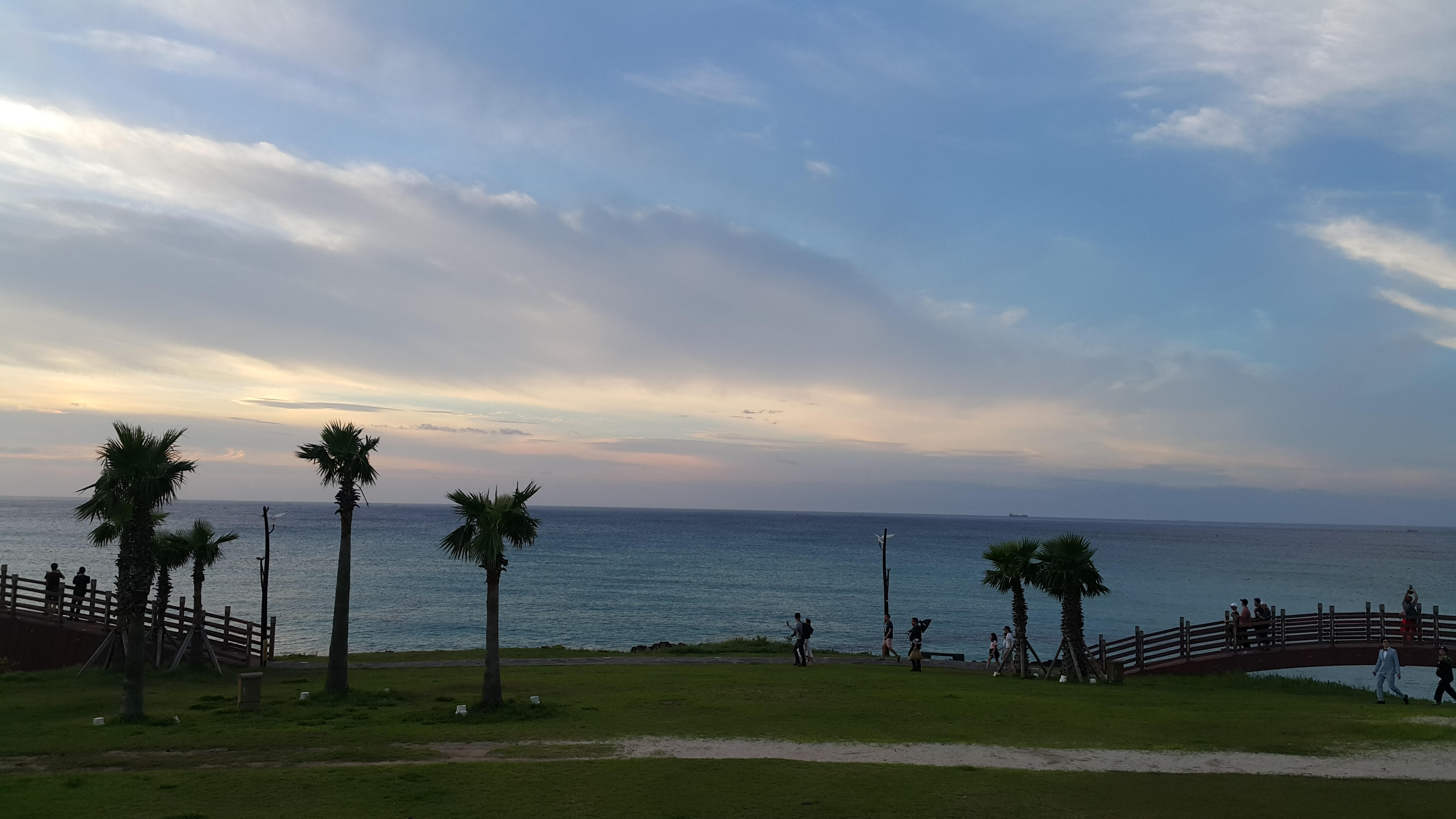 함덕 서우봉 해수욕장에서 바라본 바다